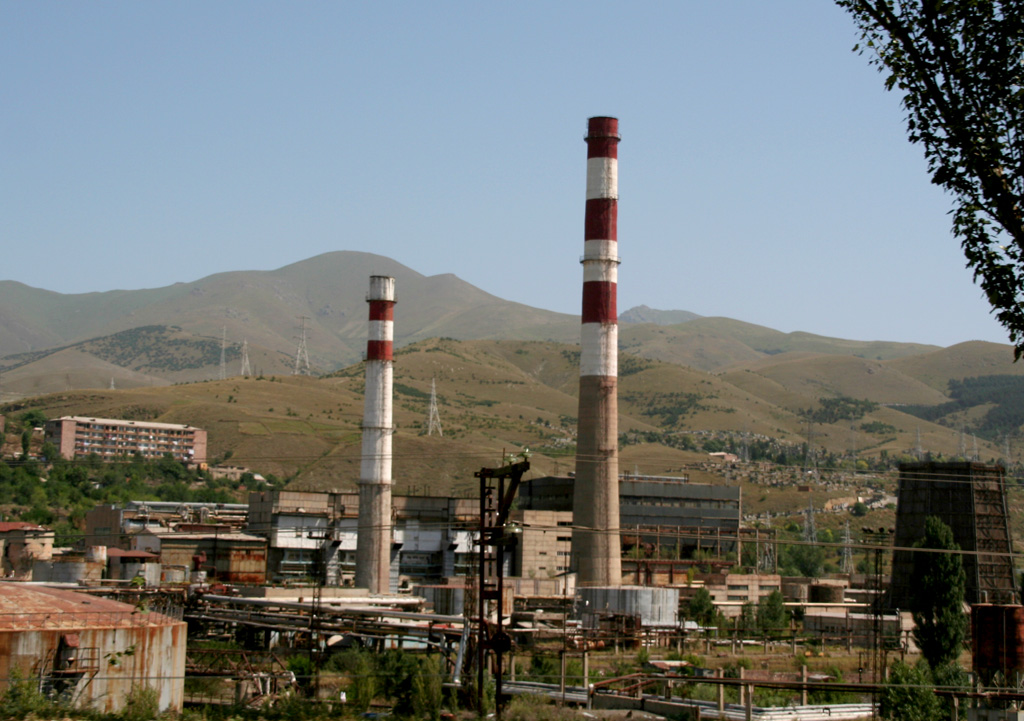 Usine à l'abandon en Arménie